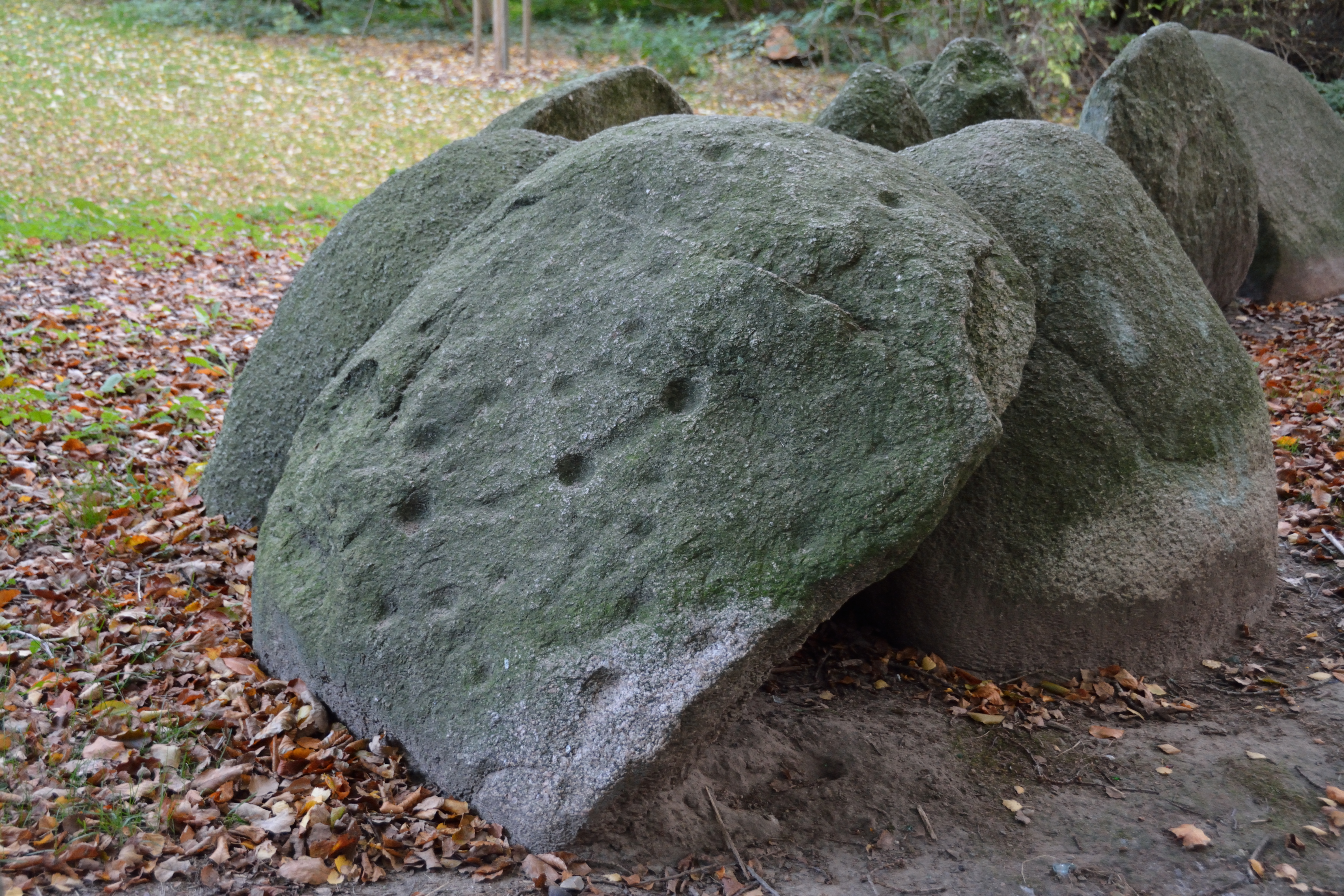 Der Schalenstein aus der "Kammer von Warringholz", die heute beim "Germanengrab (Itzehoe)" aufgebaut ist.